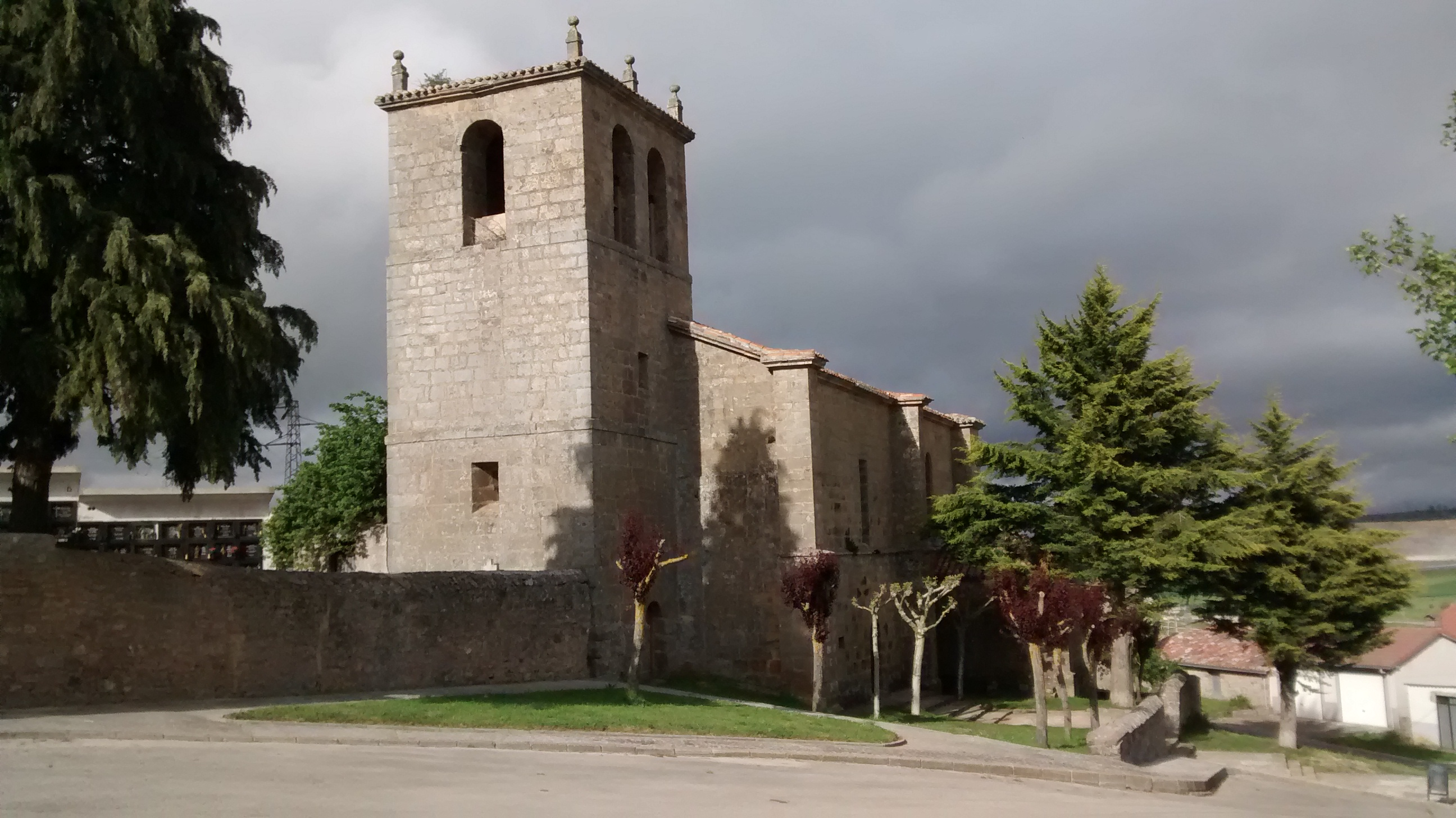 Iglesia de Santa Eulalia de Mataporquera (Cantabria, España)